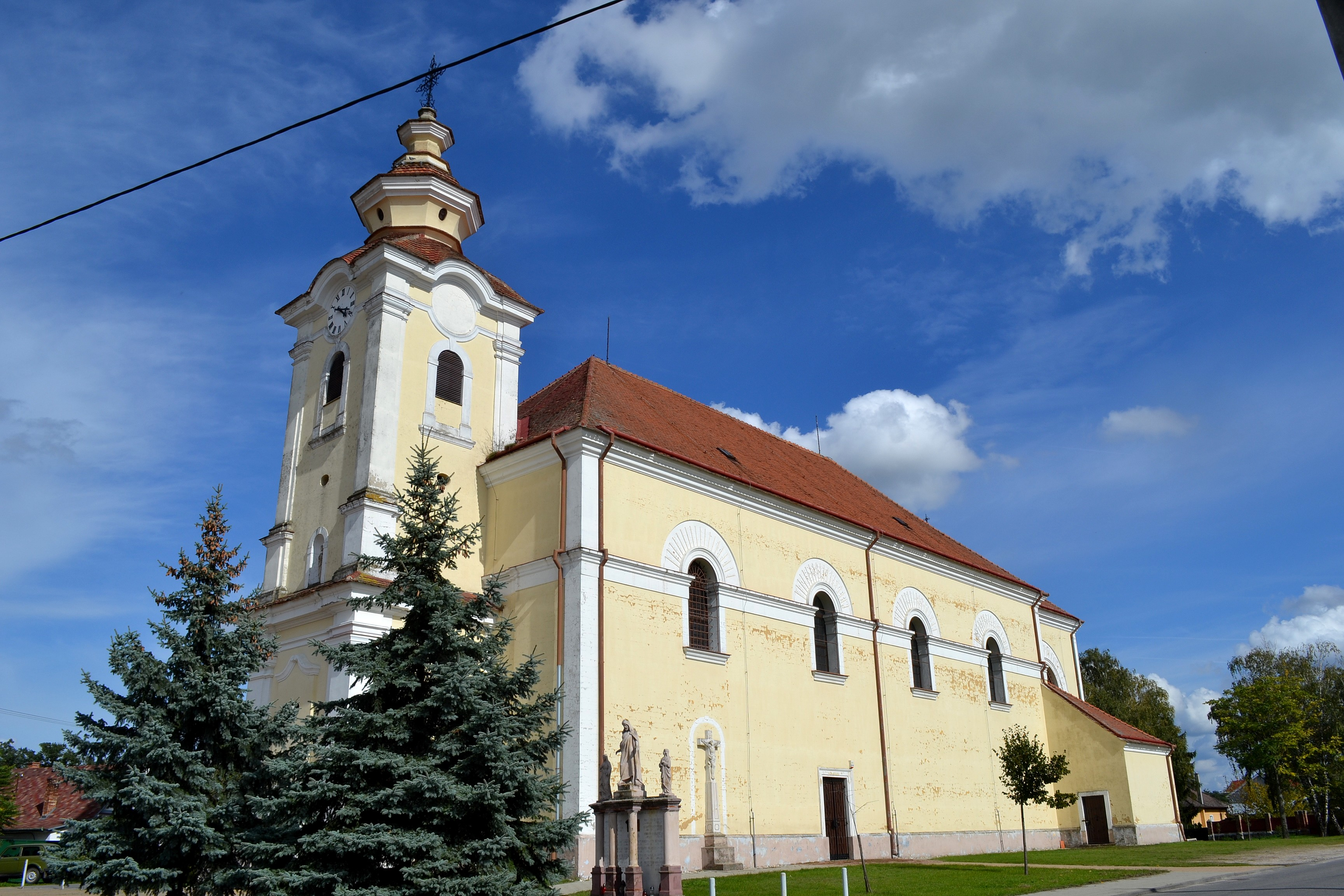 Moravský Svätý Ján (okr. Senica), Kostol svätého Jána Krstiteľa; celkový pohľad